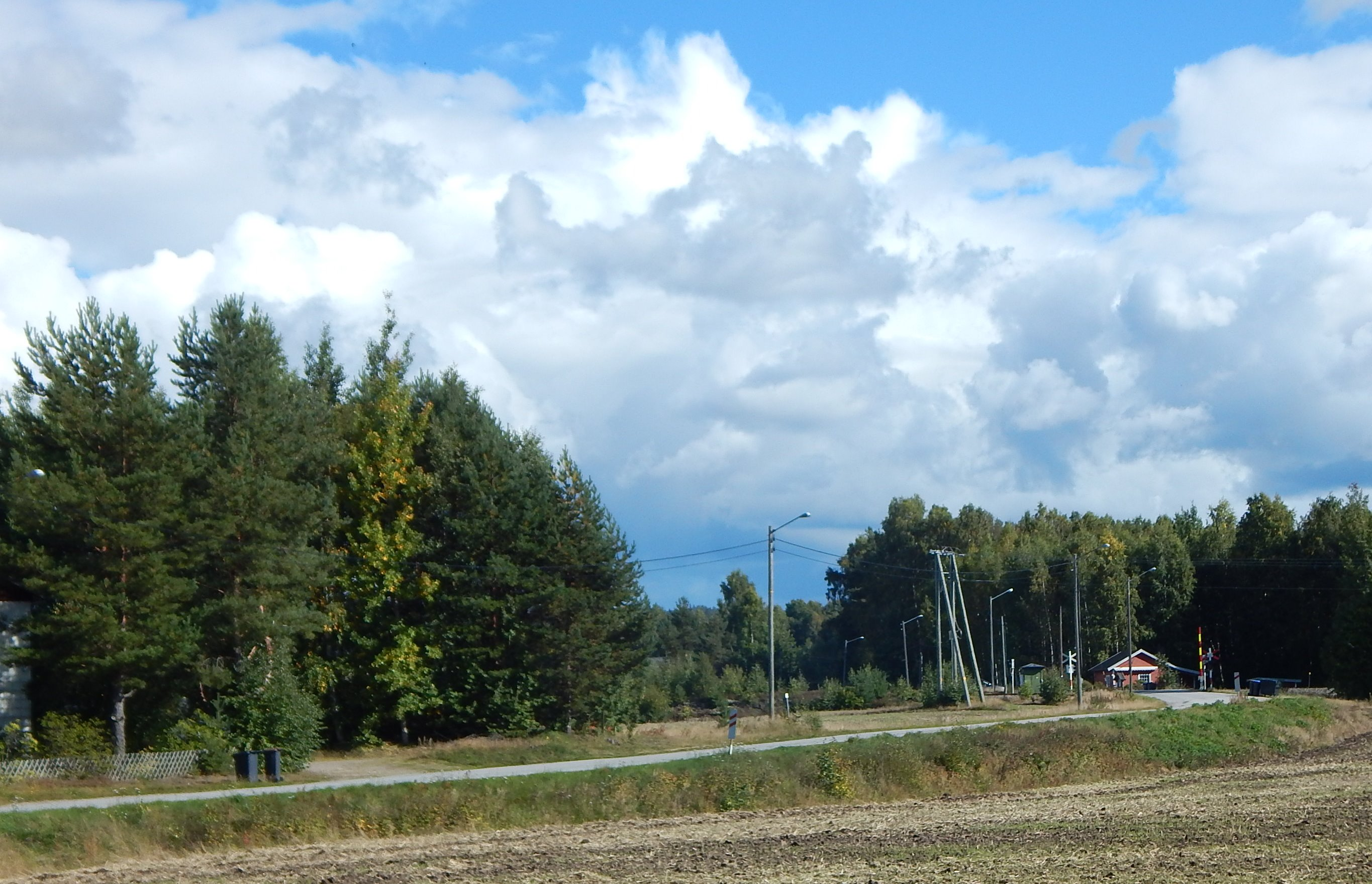 Vestenden av Feltvegen (fylkesvei 417) mot Solørvegen (riksvei 2)